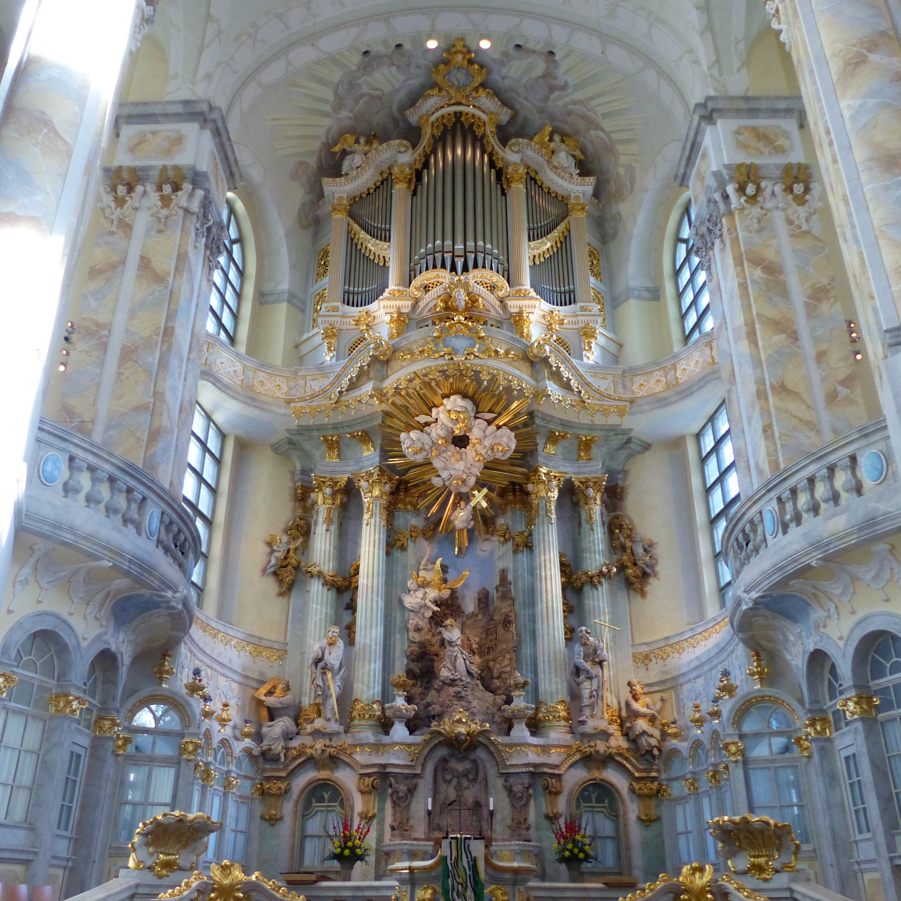 Frauenkirche Dresden von Innen